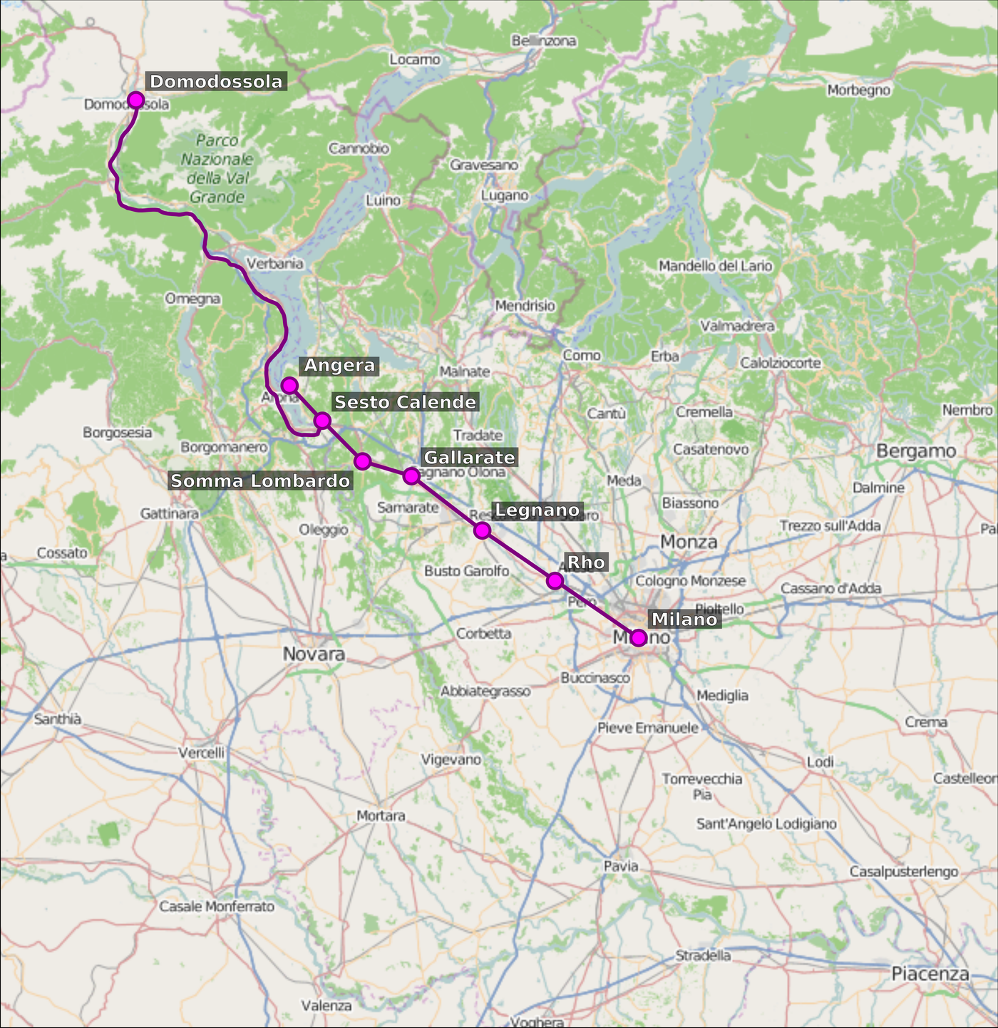 Ipotesi del percorso della via Mediolanum-Verbannus secondo gli atti delle conferenze "Insediamenti, strade e vie d'acqua da Milano alla Svizzera"